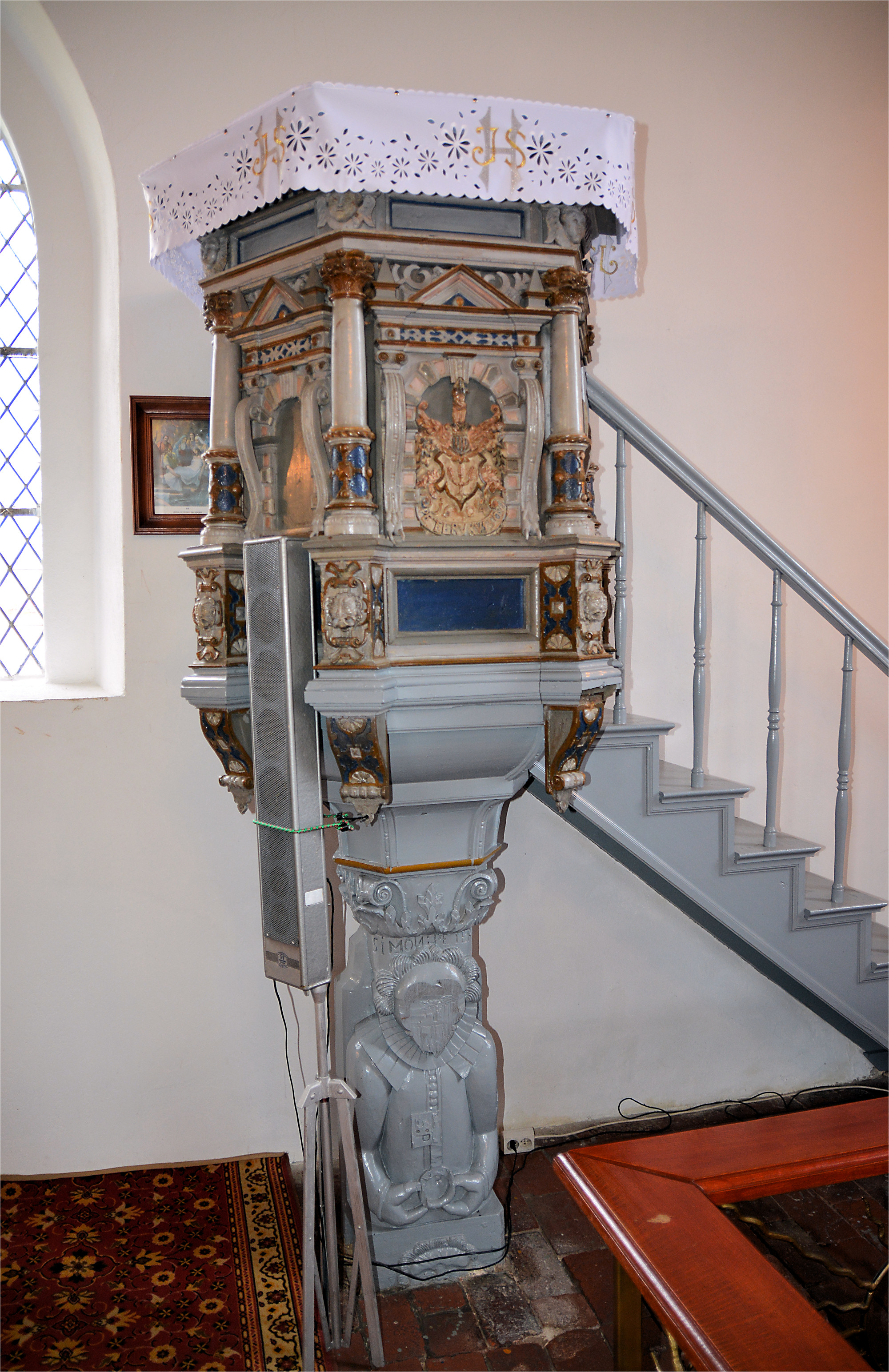 Mechowo - rzymskokatolicki kościół filialny p.w. św. Izydora, XIV, 1738, 1861